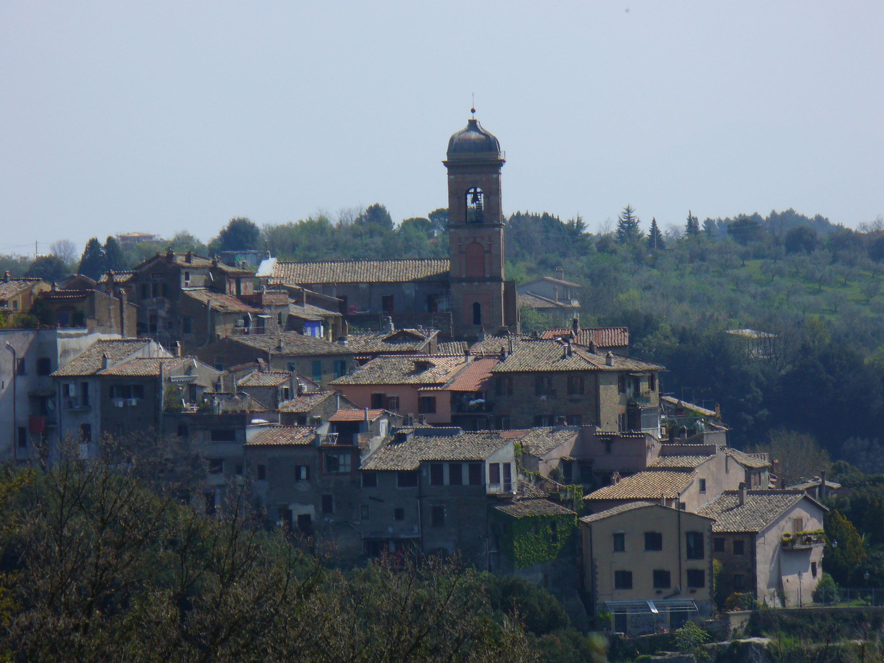 Morlupo (RM) - Vista da Ovest